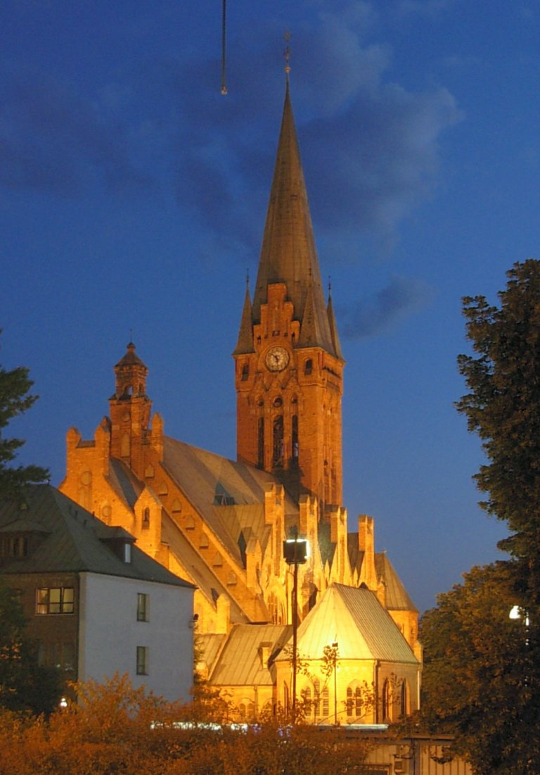 Kościół jezuitów św. Andrzeja Boboli w Bydgoszczy